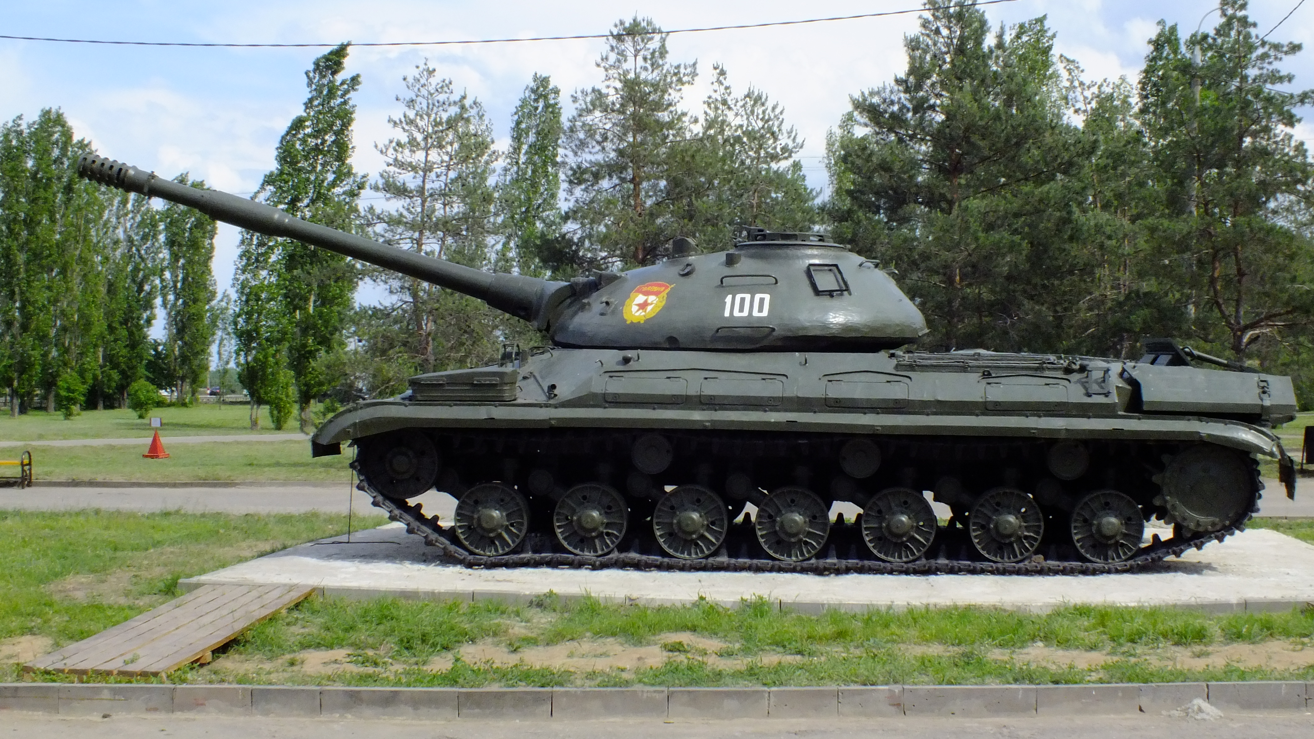 Парк Победы, г.Нижний Новгород